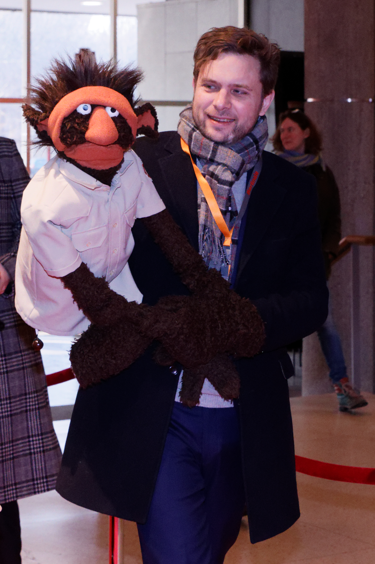 Roter Teppich zu Upp i det blå bei der Berlinale 2017: Petter Lennstrand mit Puppen "Rydberg".